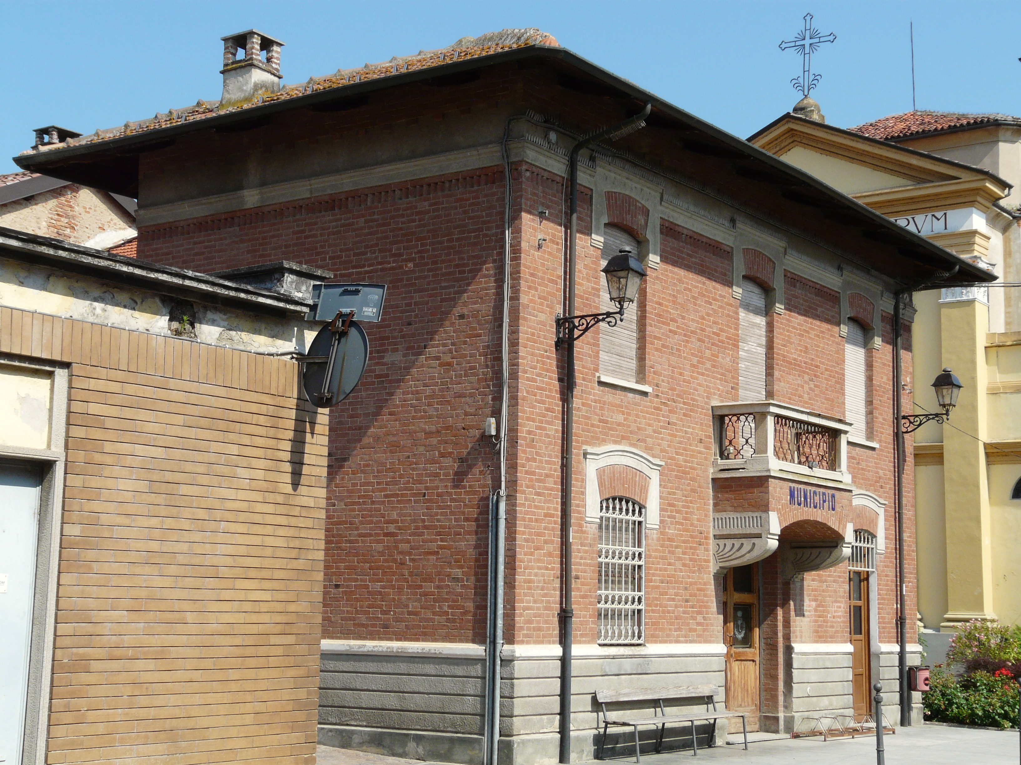 Municipio, Giarole, Piemonte, Italia